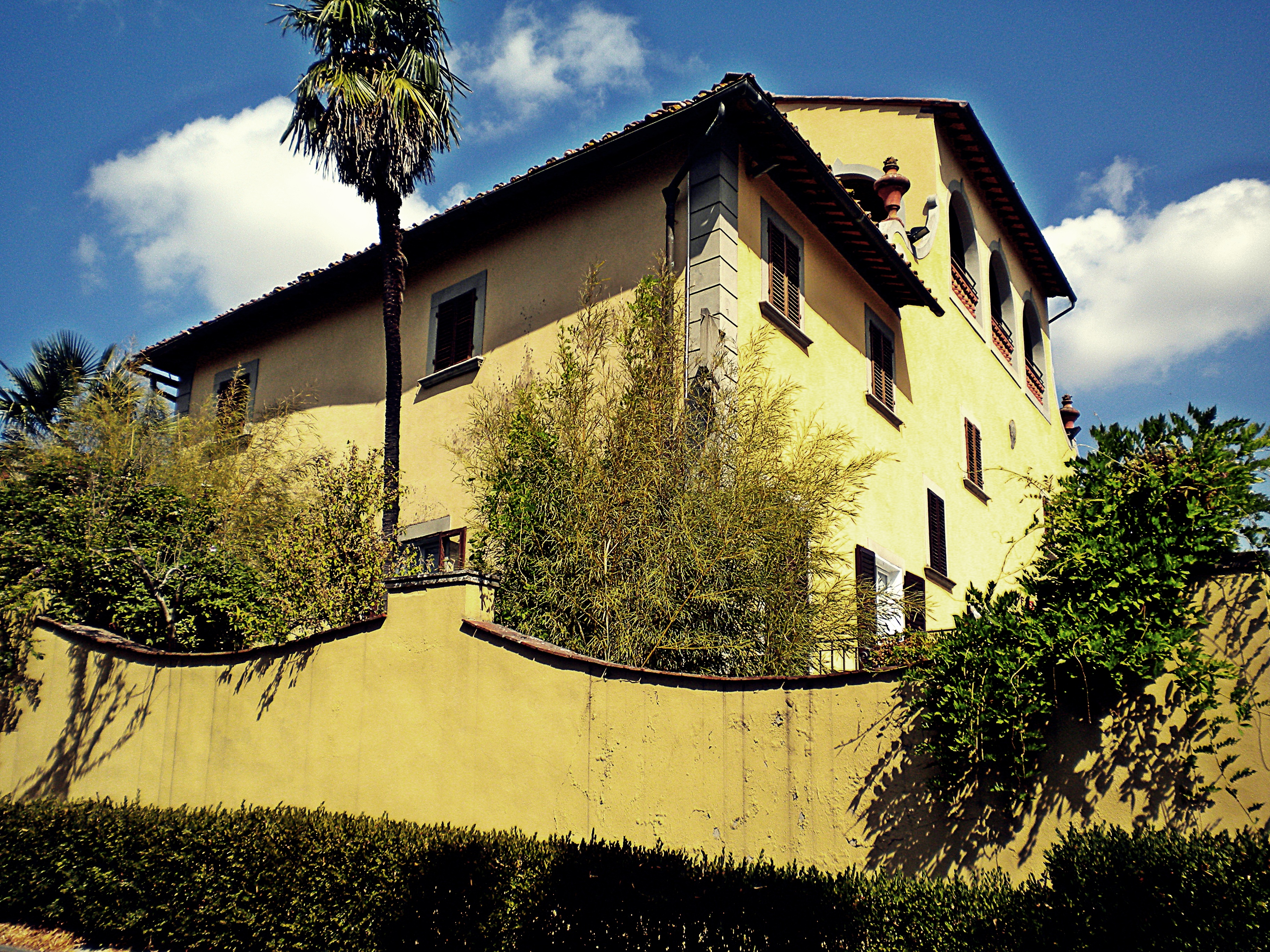 villa